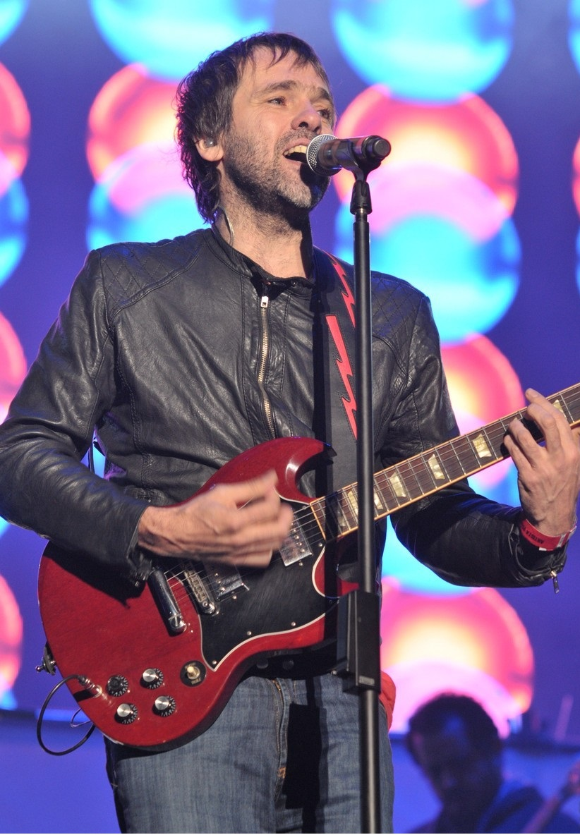 El cantautor argentino, Diego Demarco en 2014.